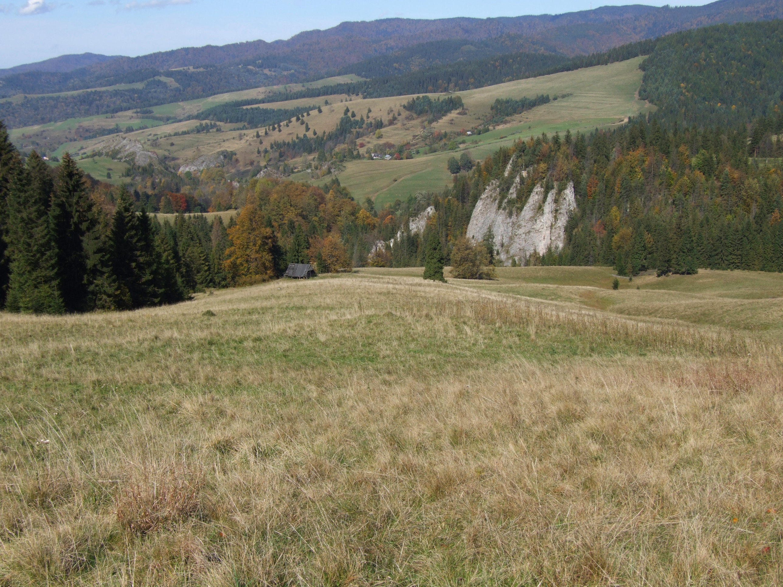 Biała Woda (Małe Pieniny)